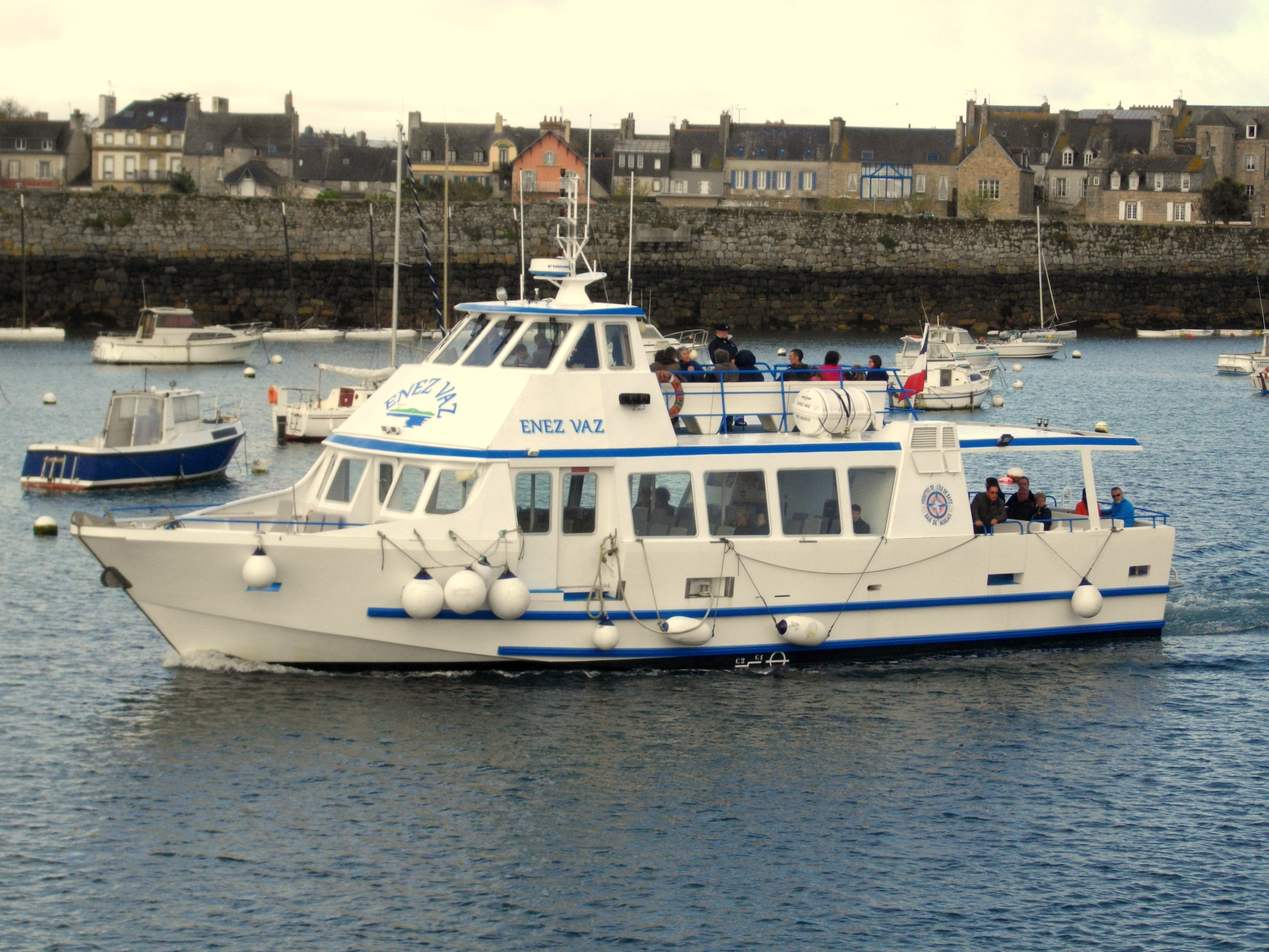 L'Enez Vaz dans le port de Roscoff